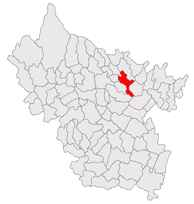 Categorie:Hărţi ale judeţului Buzău